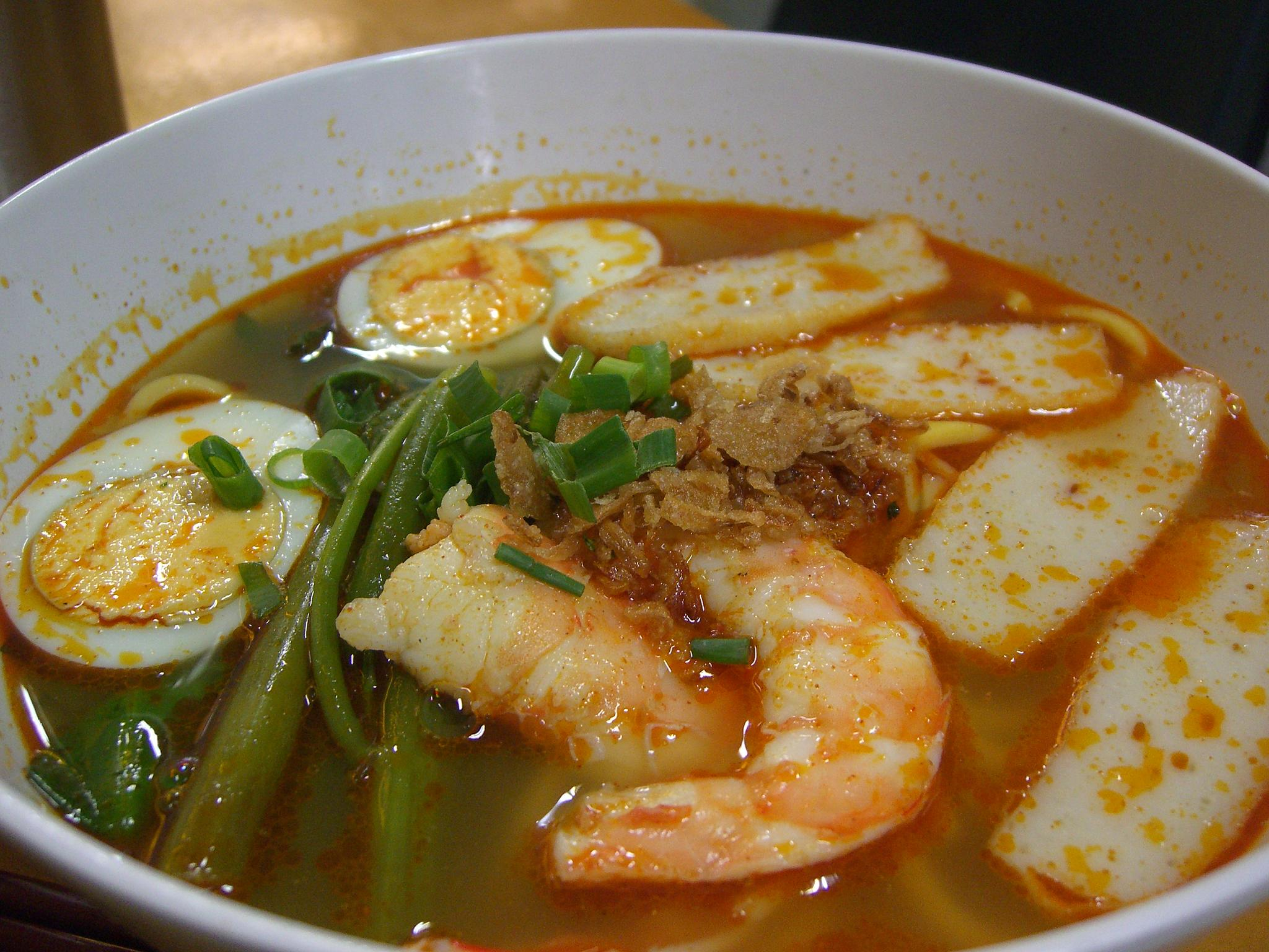 Penang Har Mee